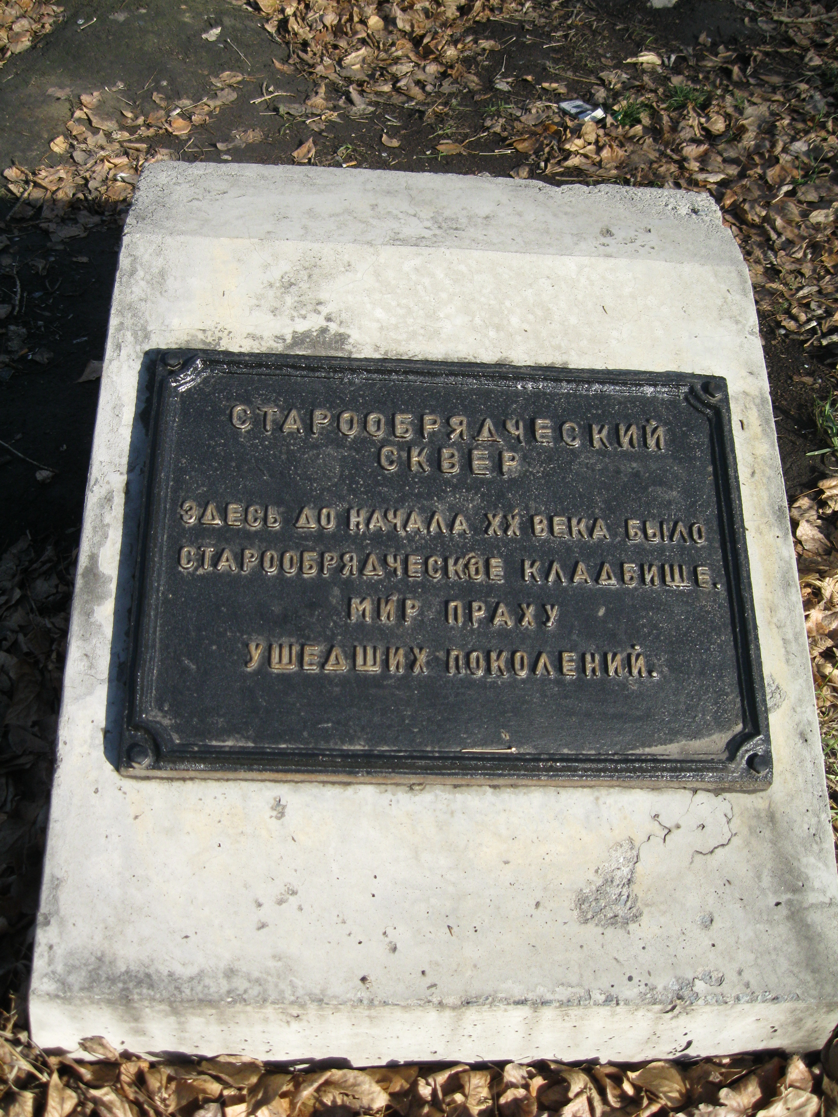 Памятный знак в Старообрядческом сквере в Кургане, Россия